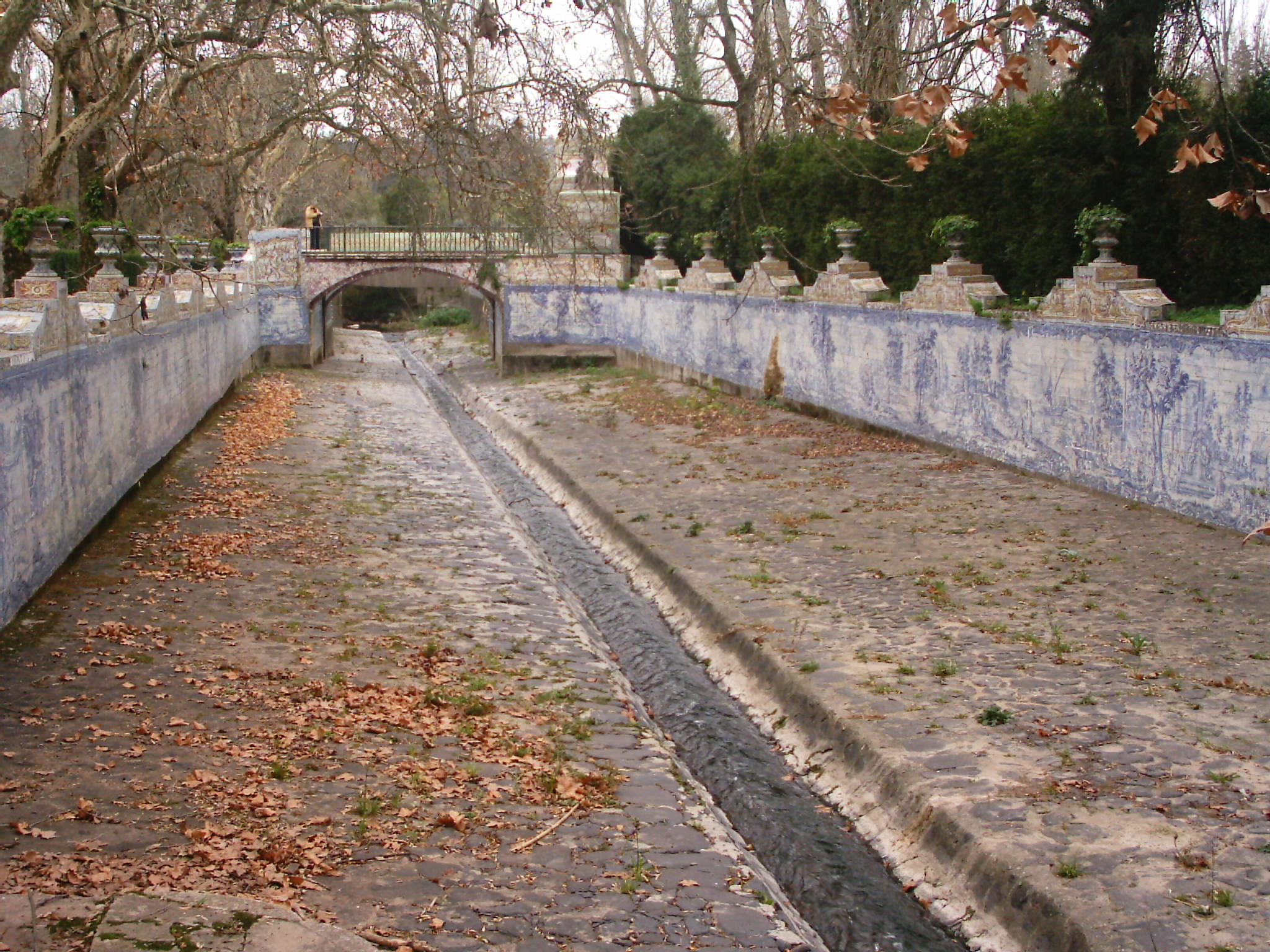 Palácio de Queluz, Portugal. Vista para o Corredor das Mangas.